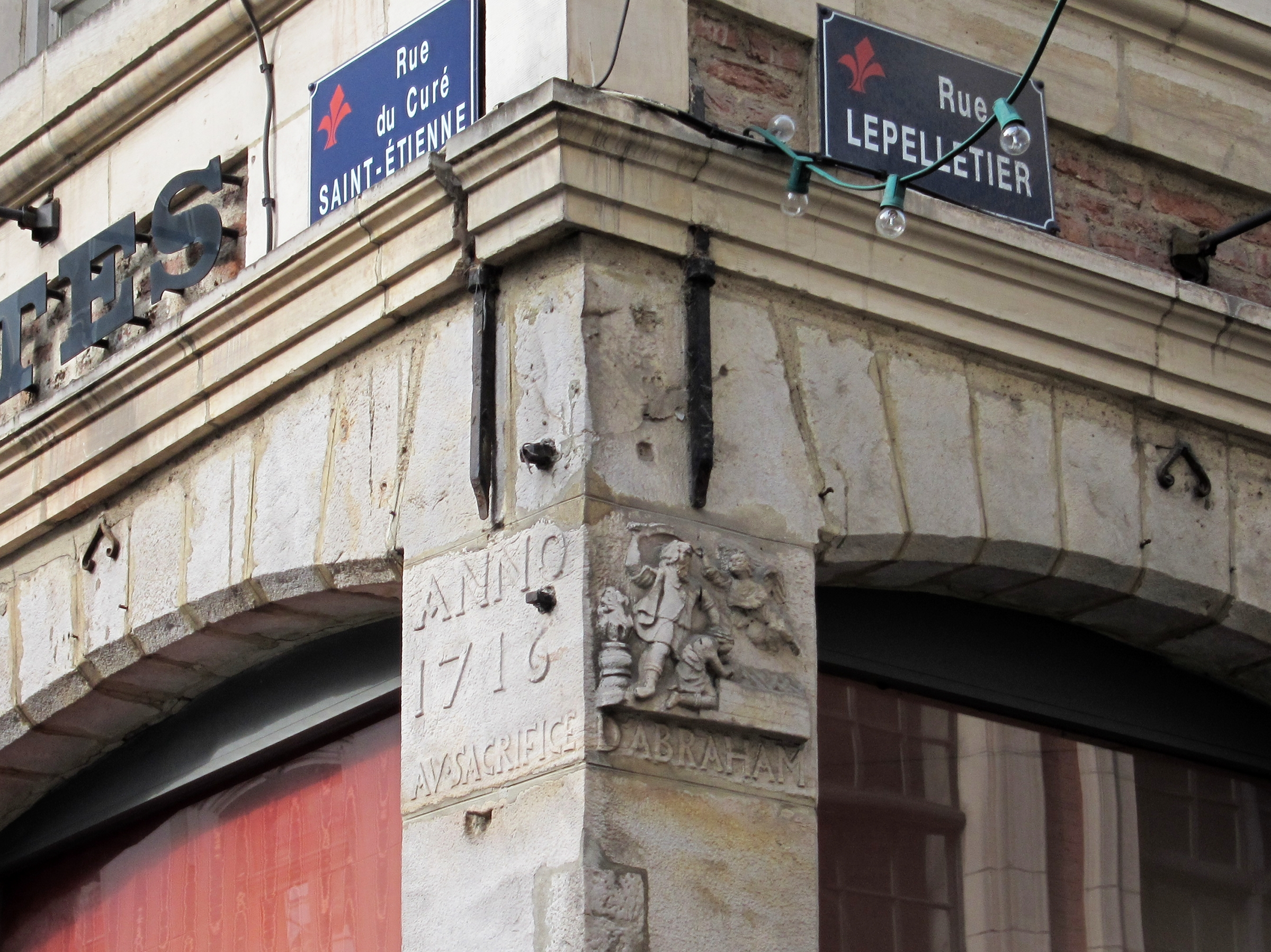 Enseigne en pierre sculptée représentant le sacrifice d'Abraham, 23 rue du Curé Saint-Etienne à Lille.